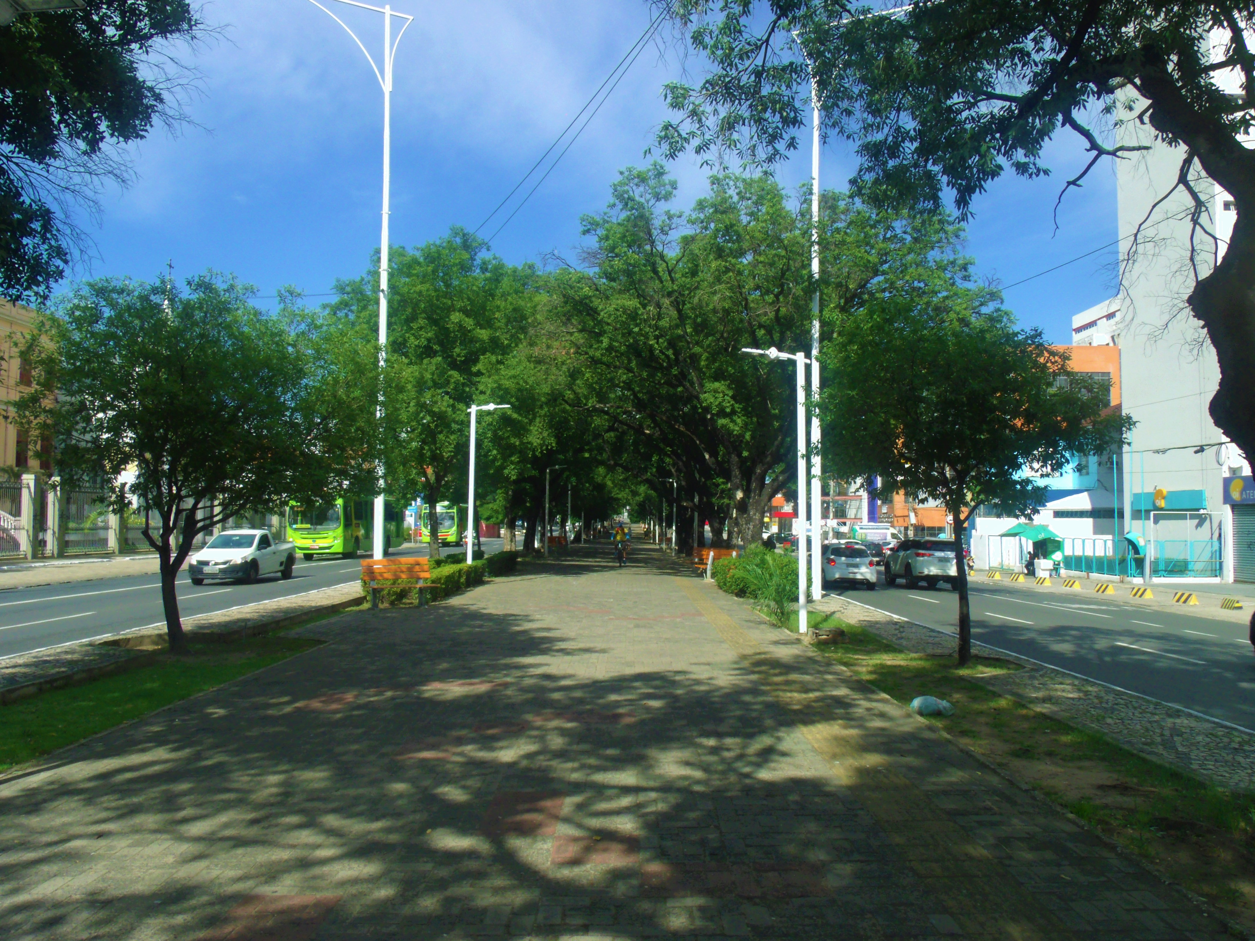 Vista do passeio pedestral de centro na avenida Frei Serafim de Teresina.